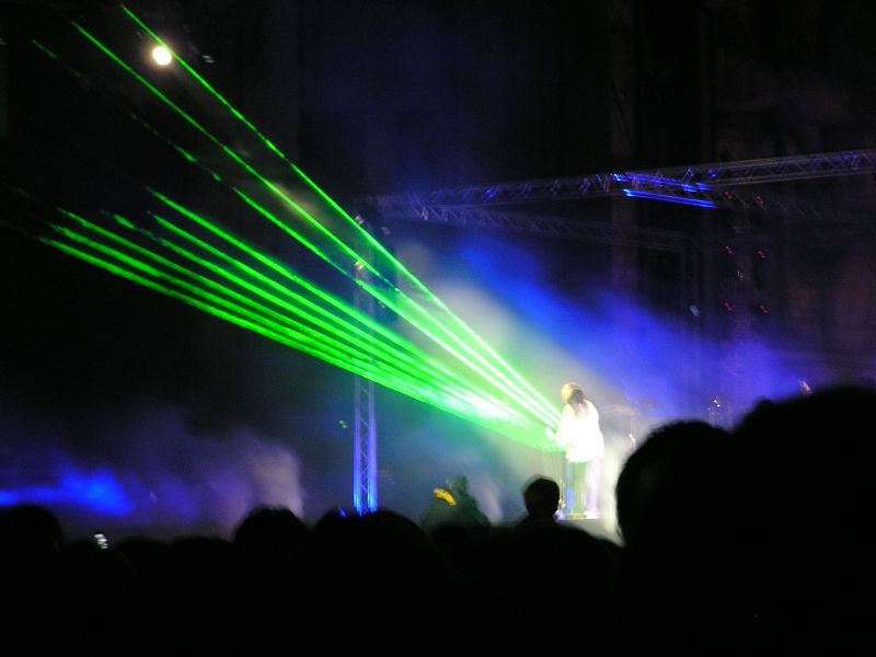 Jean Michel Jarre podczas koncertu Przestrzeń Wolności w Gdańsku, grający na harfie laserowej.